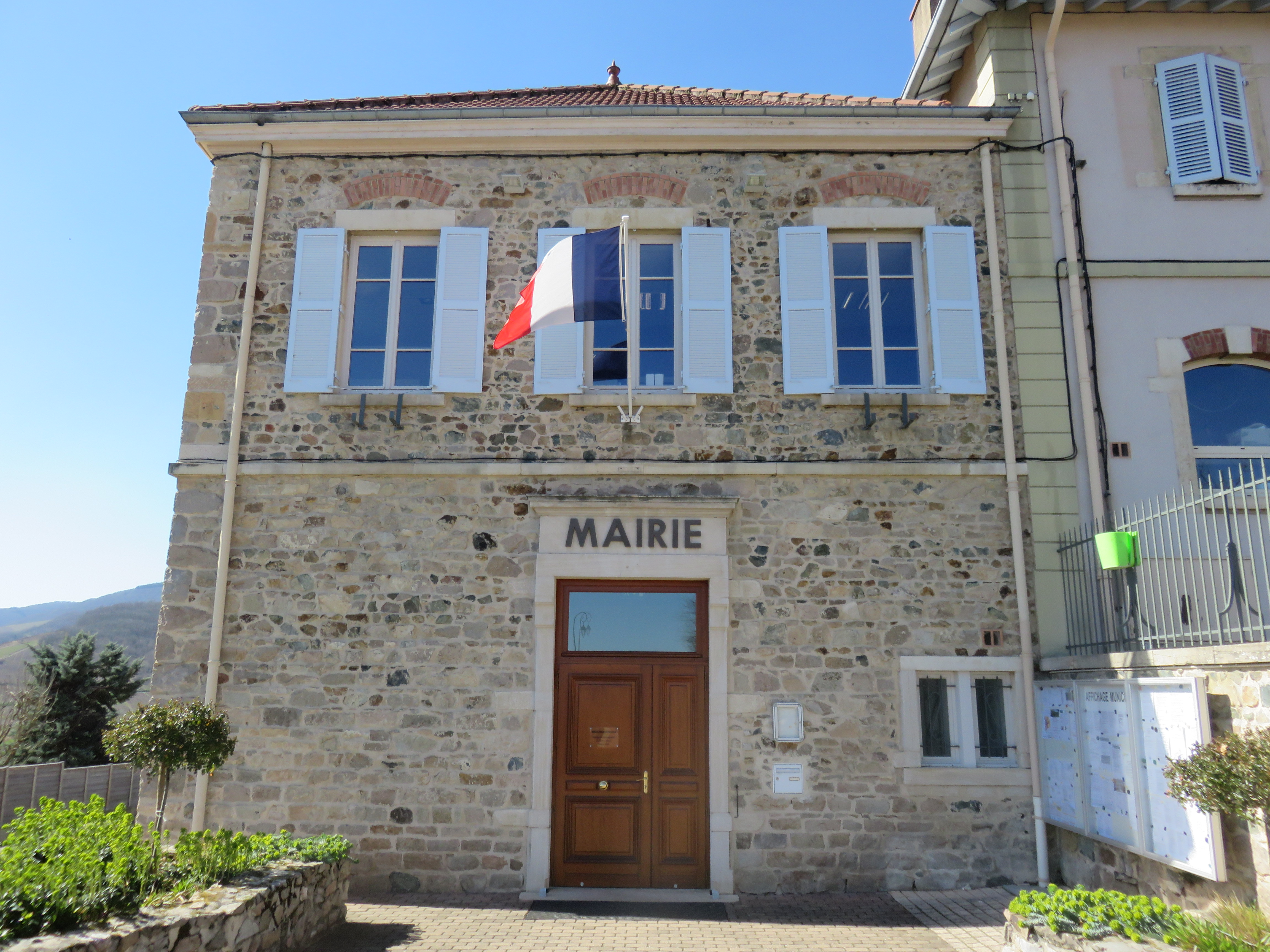 Vue de la mairie de Quincié-en-Beaujolais (Rhône, France).